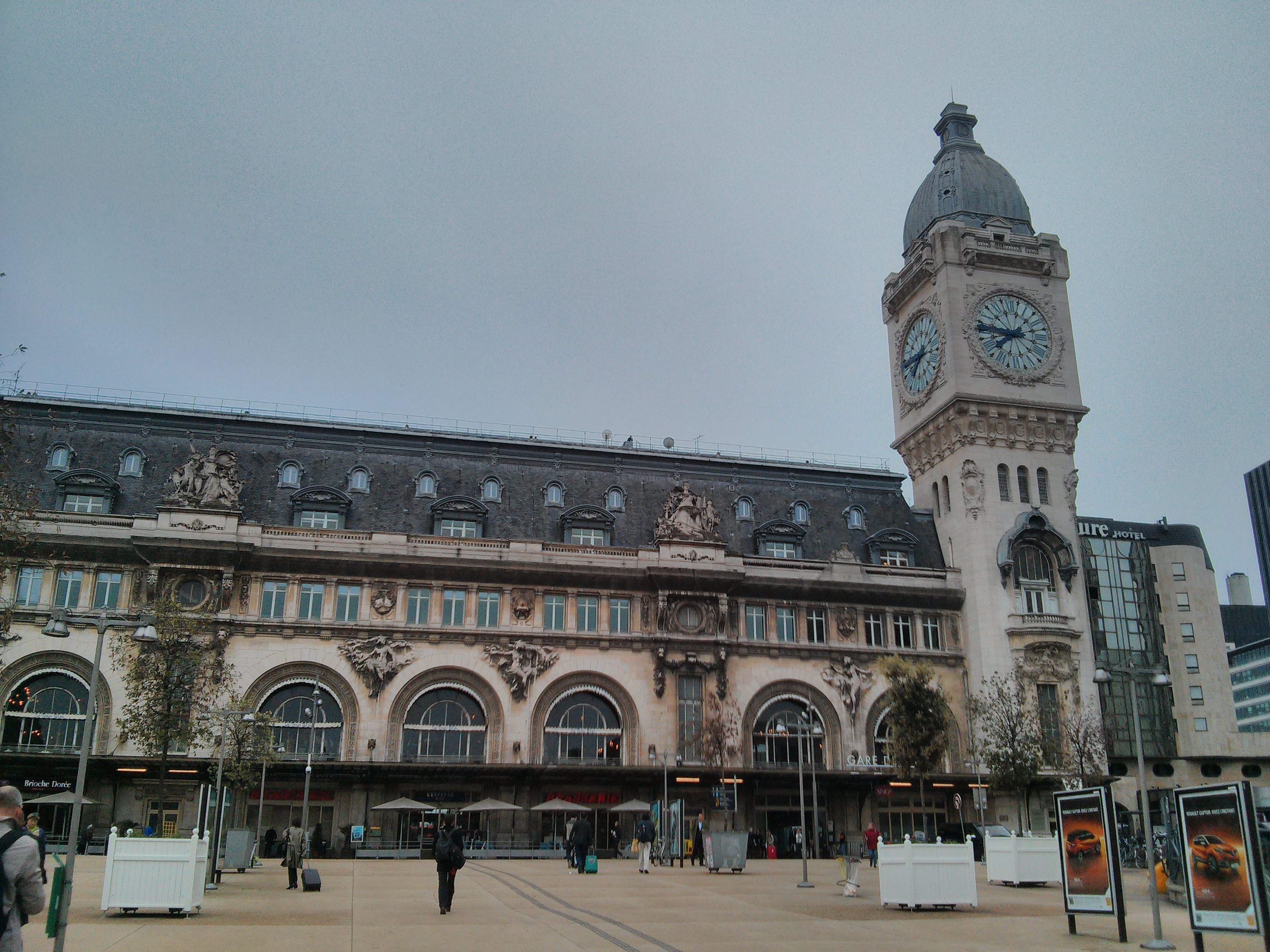 paris-france. gare de lyon